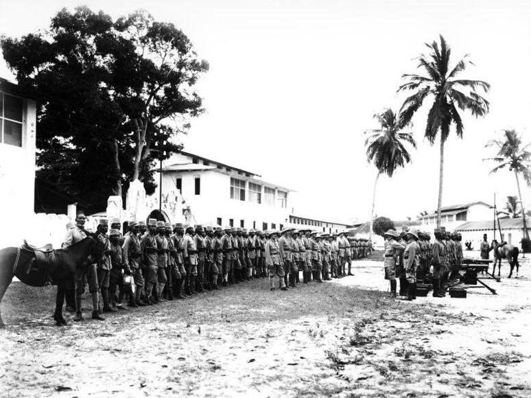 Askarikompanie beim Abmarsch